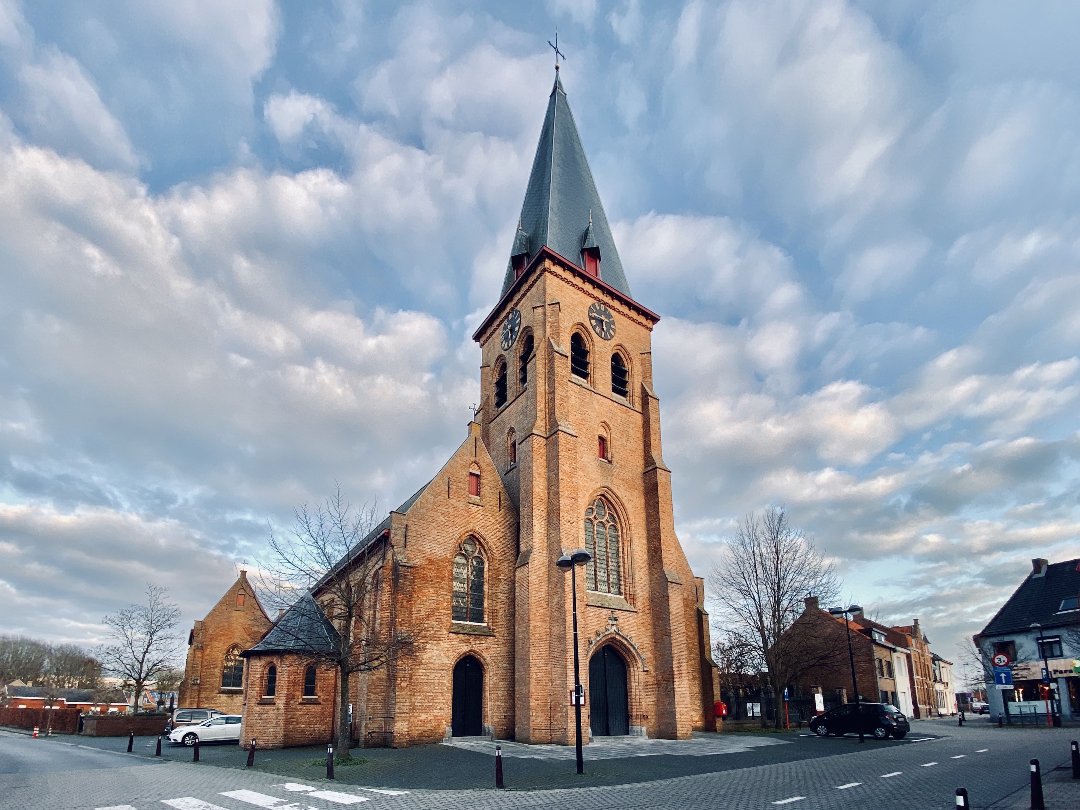 De Sint-Amanduskerk te Beernem is een katholieke kerk, gelegen aan de Bloemendalestraat in het oude dorpscentrum. De foto is gemaakt op 26 februari 2020